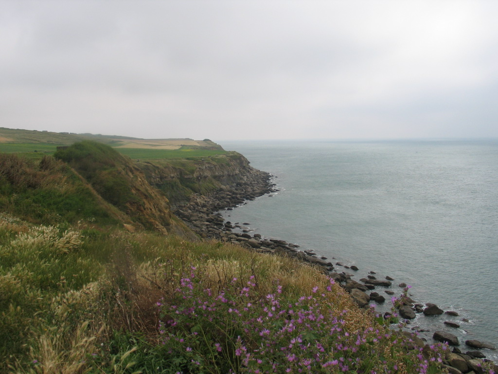 Cap Gris-Nez - eigen foto